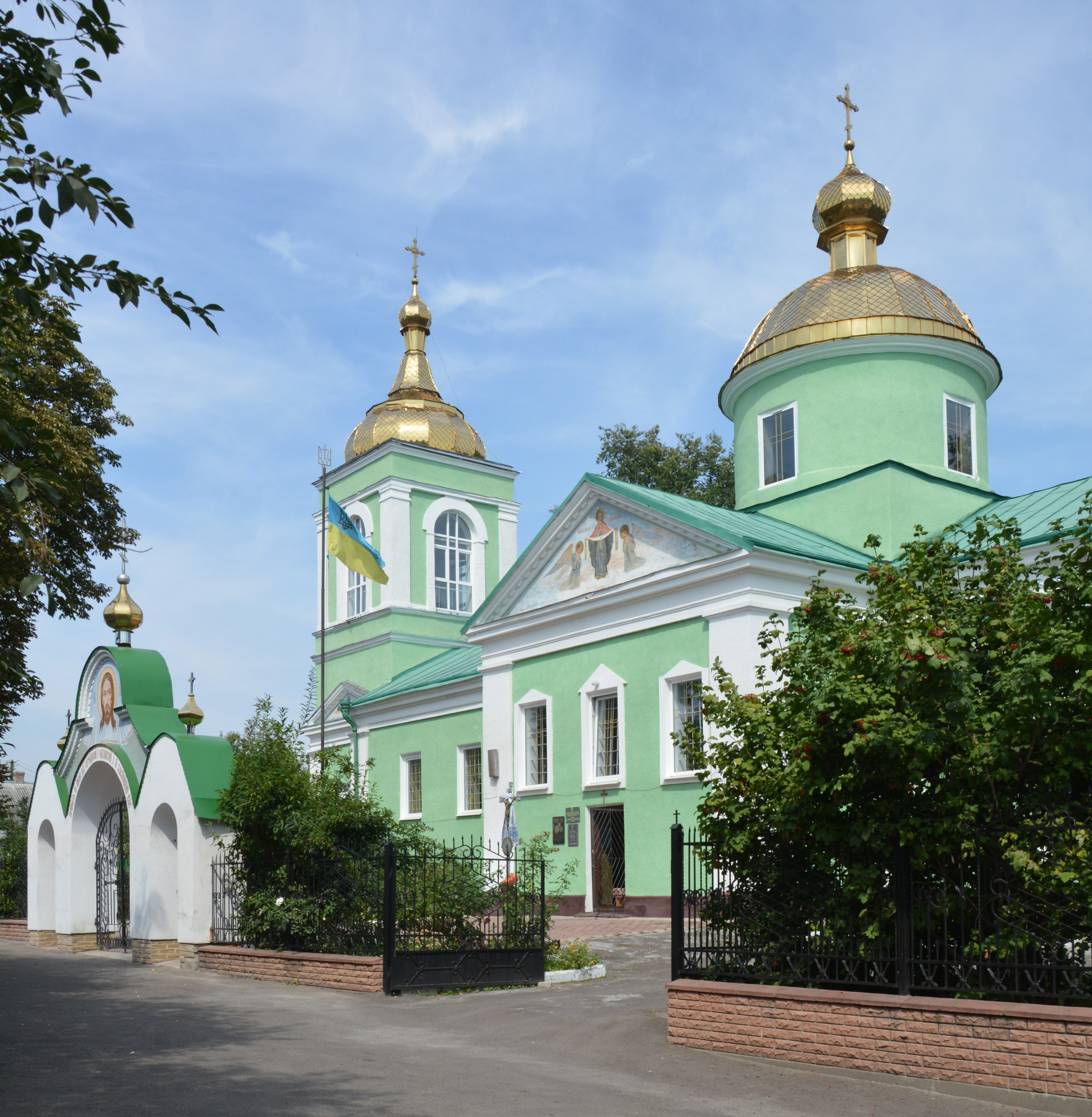 Ансамбль Вознесенської церкви, Горохів